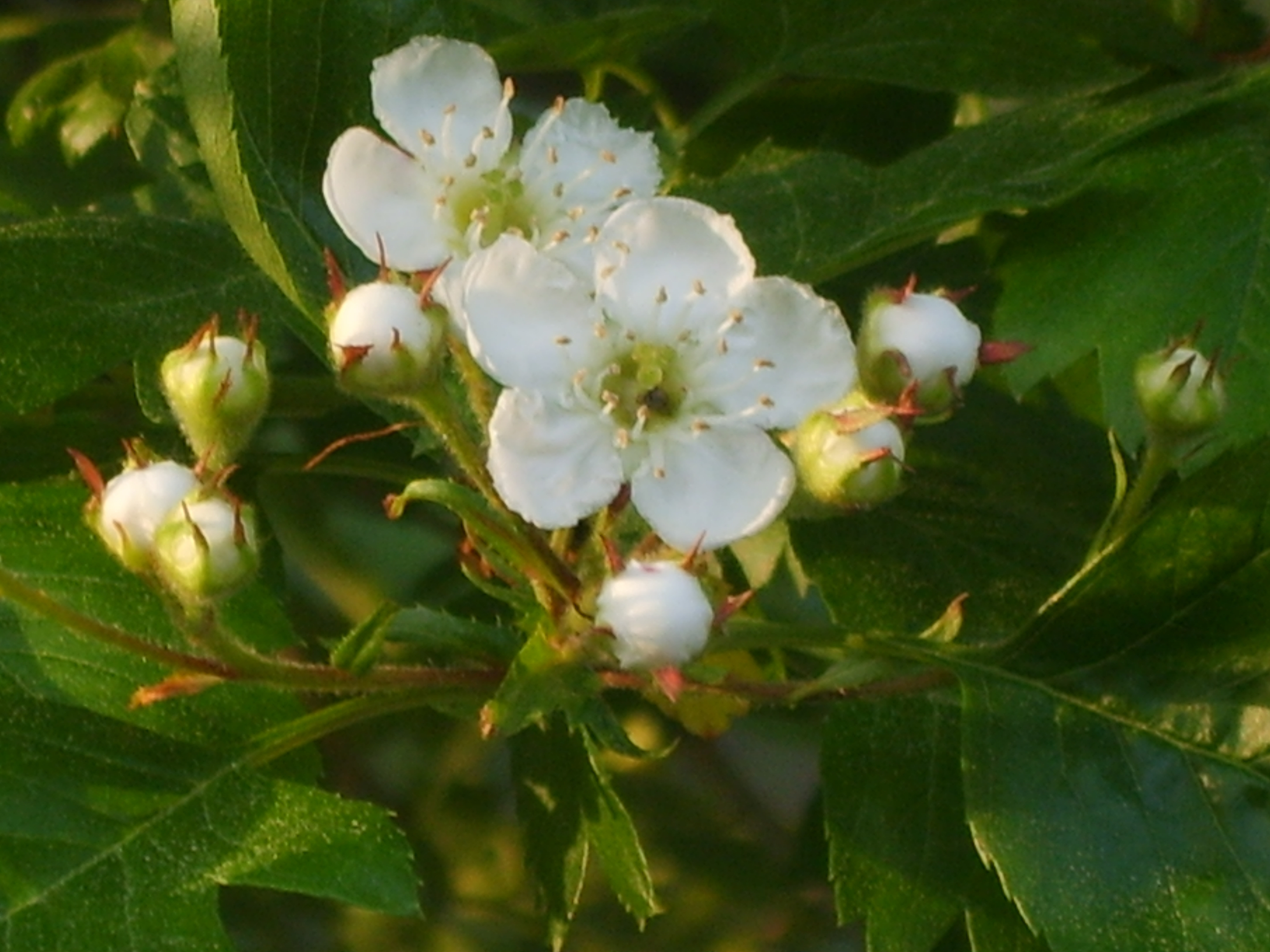 Crataegus pinnatifida in Hampyung Korea. 함평 자연생태공원에 사는 산사나무의 꽃.